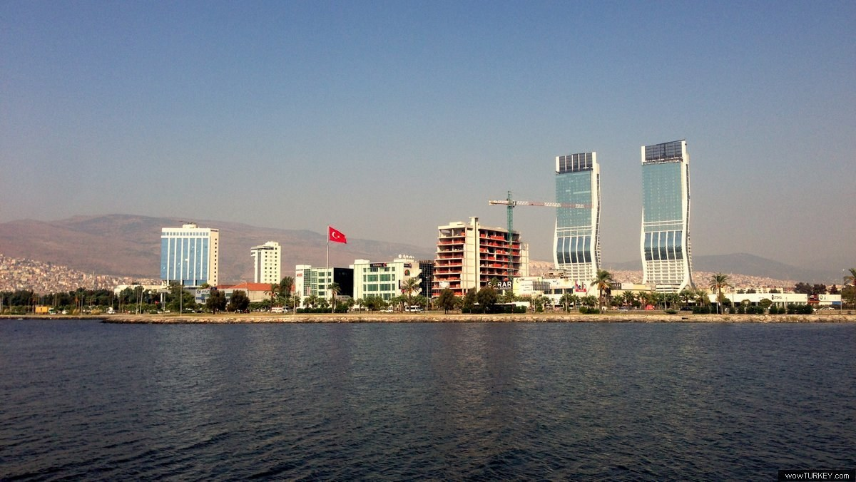 bayraklı